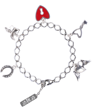 Чарм-браслет с пятью подвесками-чармами. Серебро 925.